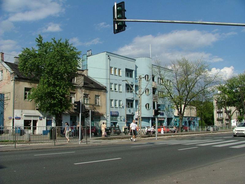 Pl, Warsaw, Poland, Praga Południe, Grochowska Street